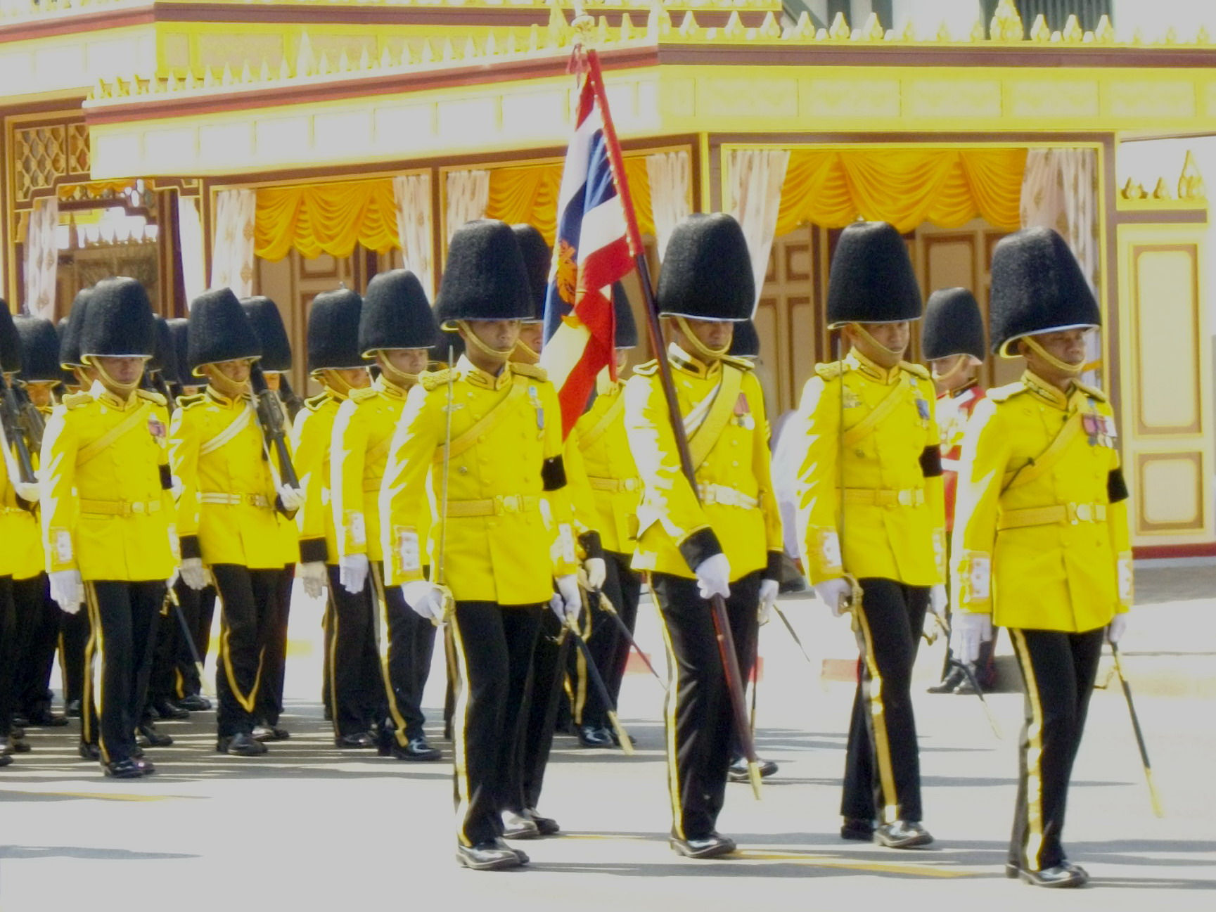 หมู่เชิญธงชัยเฉลิมพลของกองพันทหารราบที่ 1 กรมทหารราบที่ 1 รักษาพระองค์ กองพลนาวิกโยธิน ในริ้วกระบวนเชิญพระศพสมเด็จพระเจ้าพี่นางเธอ เจ้าฟ้ากัลยานิวัฒนา กรมหลวงนราธิวาสราชนครินทร์ ริ้วกระบวนที่ 2 หน้าพระที่นั่งสุทไธสวรรยปราสาท ถนนสนามไชย วันที่ 15 พฤศจิกายน พ.ศ. 2551